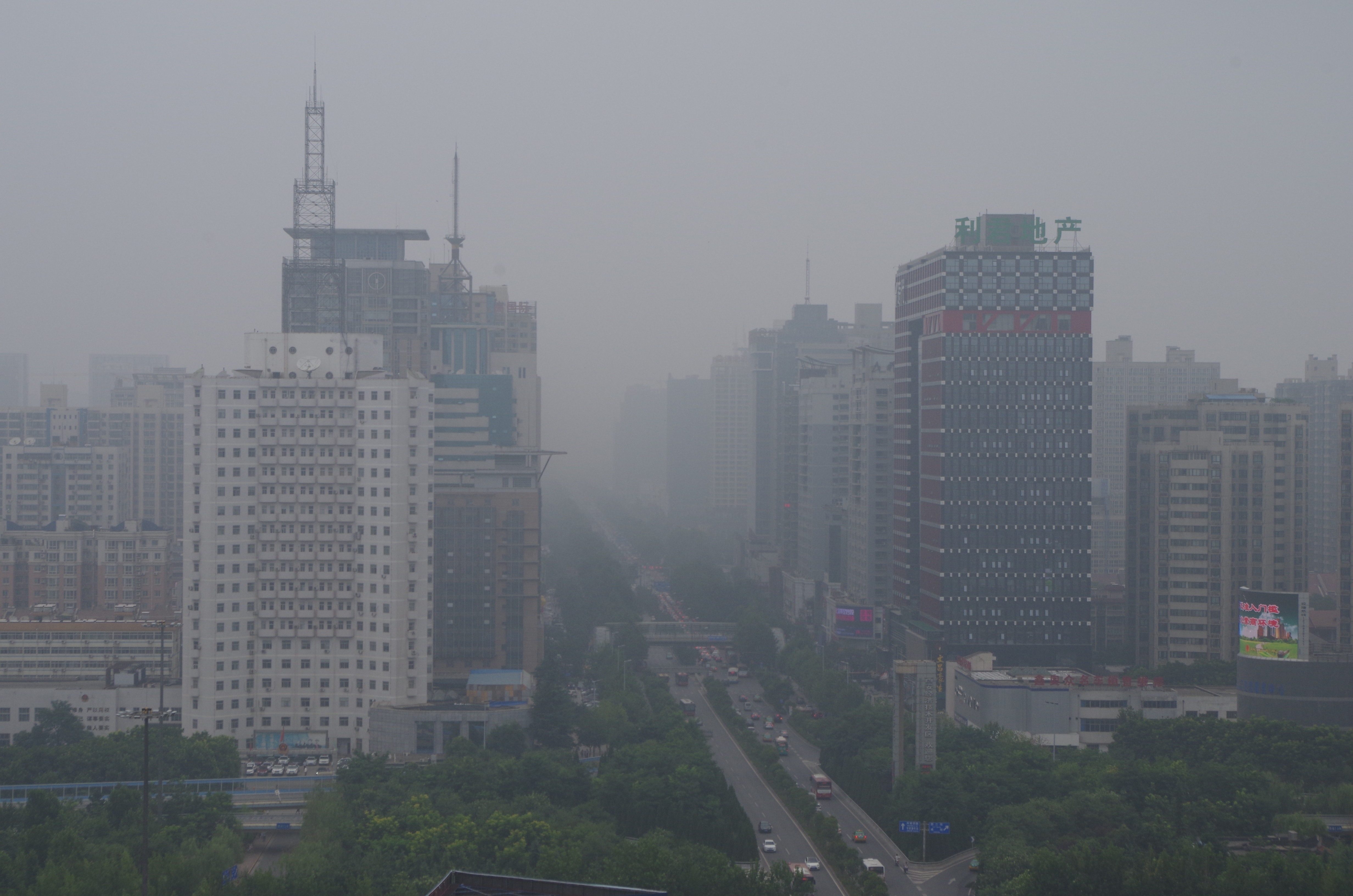 Kuvassa on savusumua Xianissa heinäkuussa 2015.